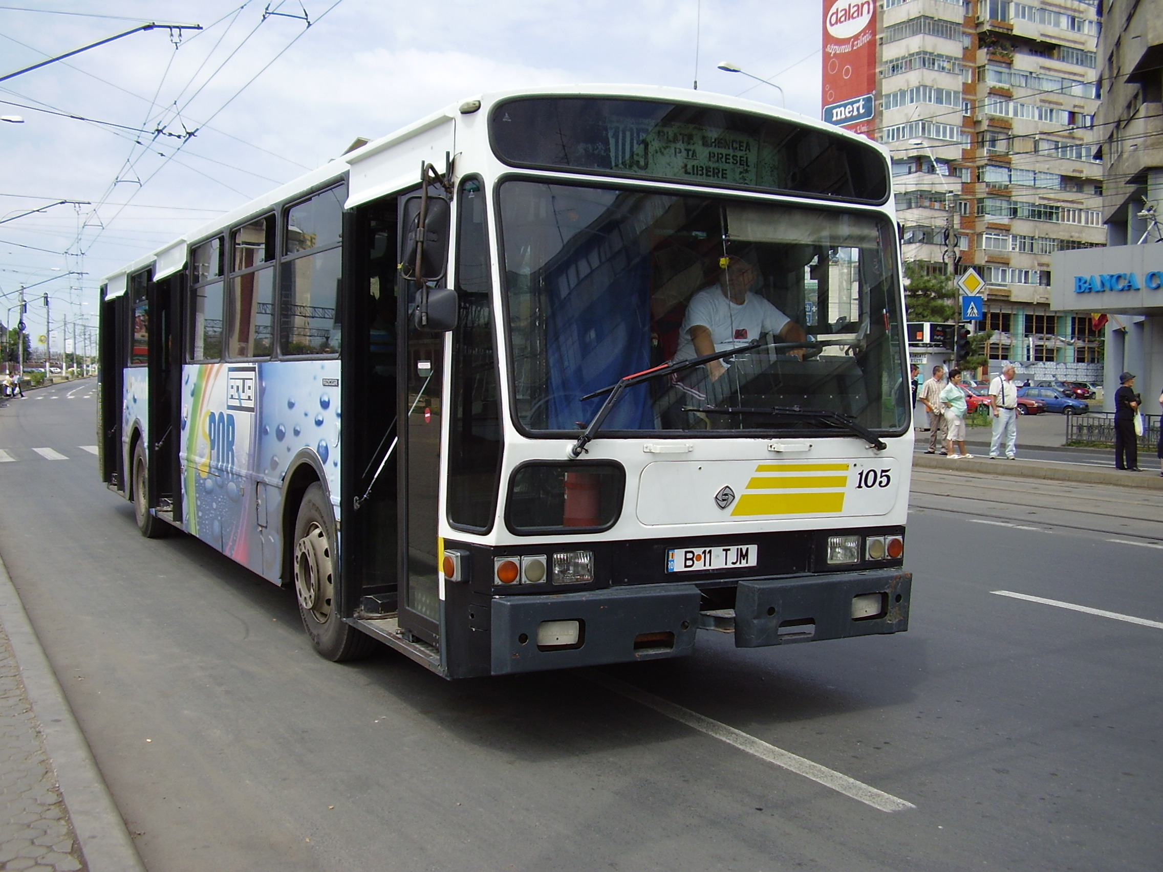 Autobuz Rocar UL 70. Foto: Dragoş Anoaica (Dr2005)